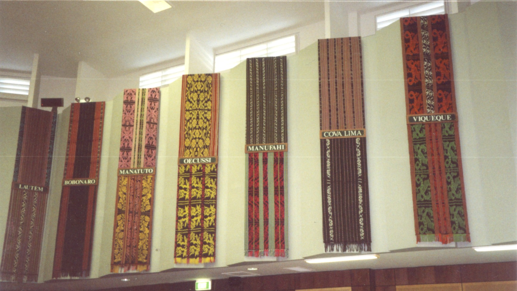 Einige der Tais im Nationalparlament Osttimors in Dili, die für die einzenlnen Distrikte stehen